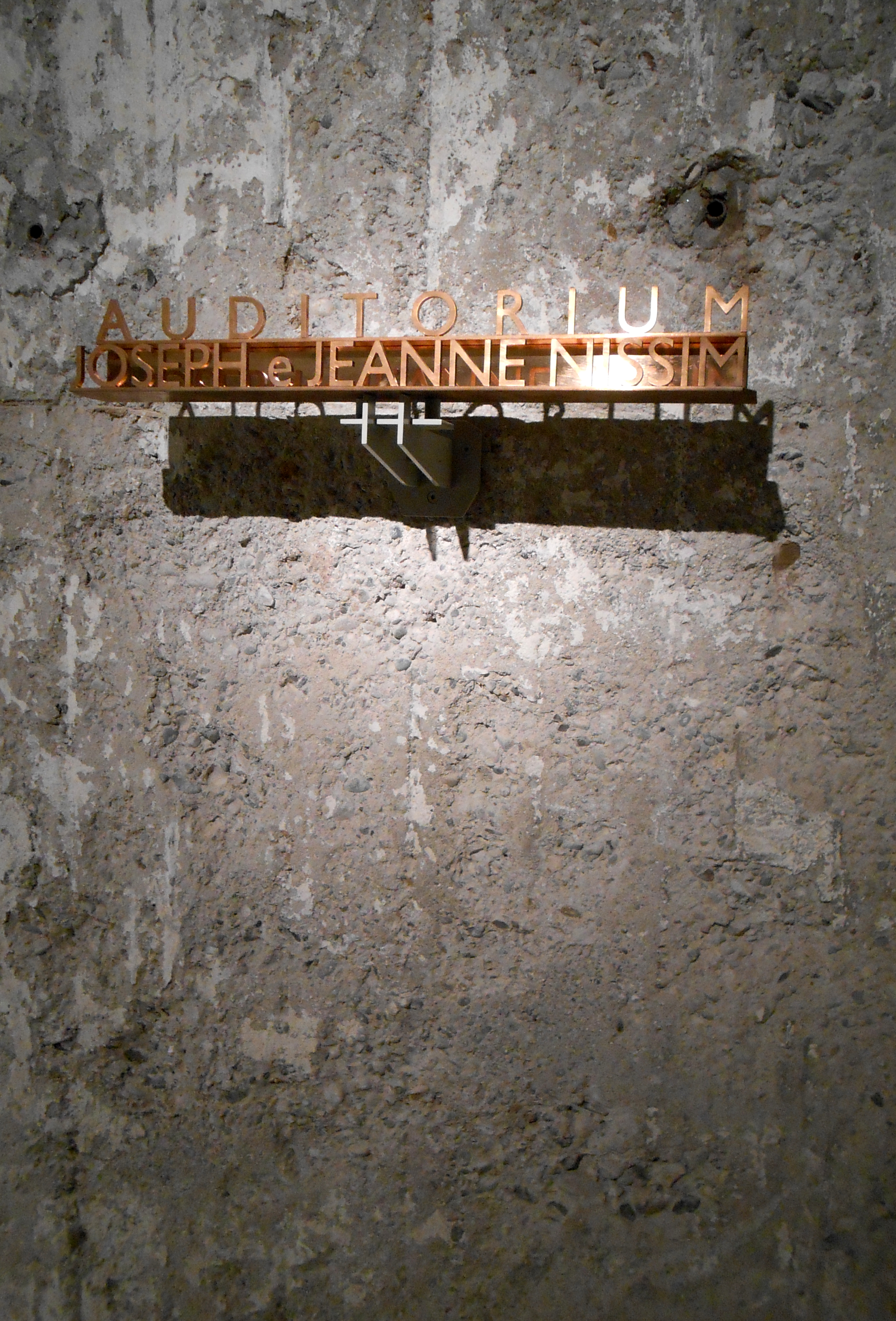 Auditorium del Memoriale della Shoah